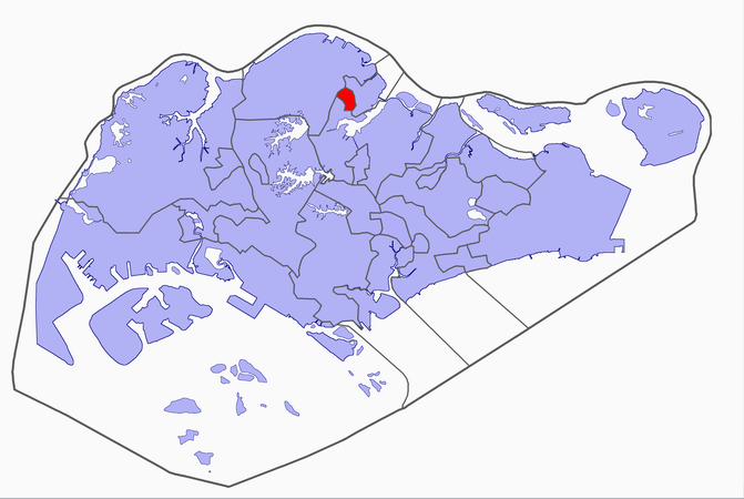 Singapore electoral map, 2006